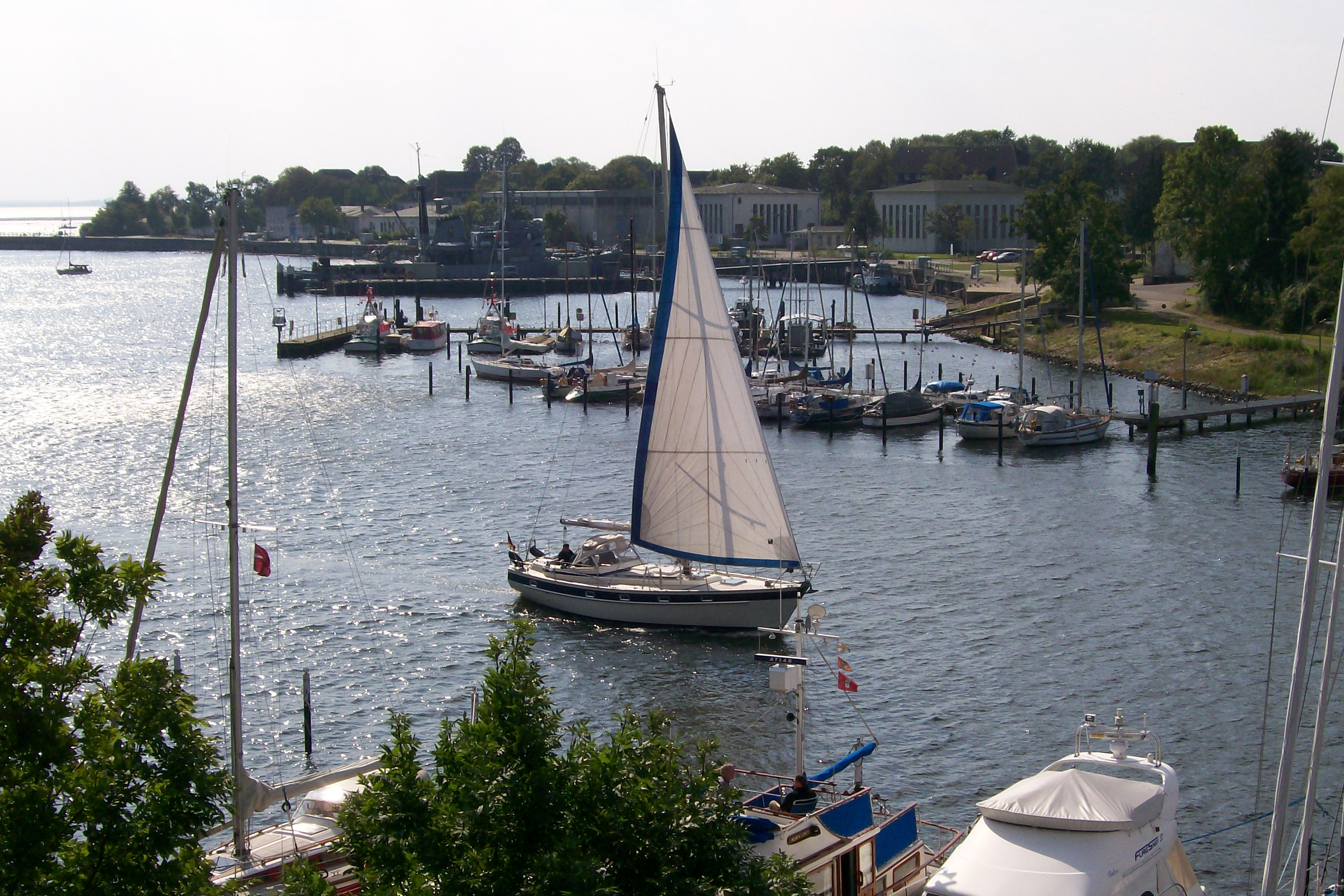 Hafen von Neustadt in Holstein, Schleswig-Holstein, Deutschland, Blick auf den Hafen in Richtung Lübecker Bucht, oberhalb des oberen Jungsfernstiegs von der Terrasse des Hotels Wallburg